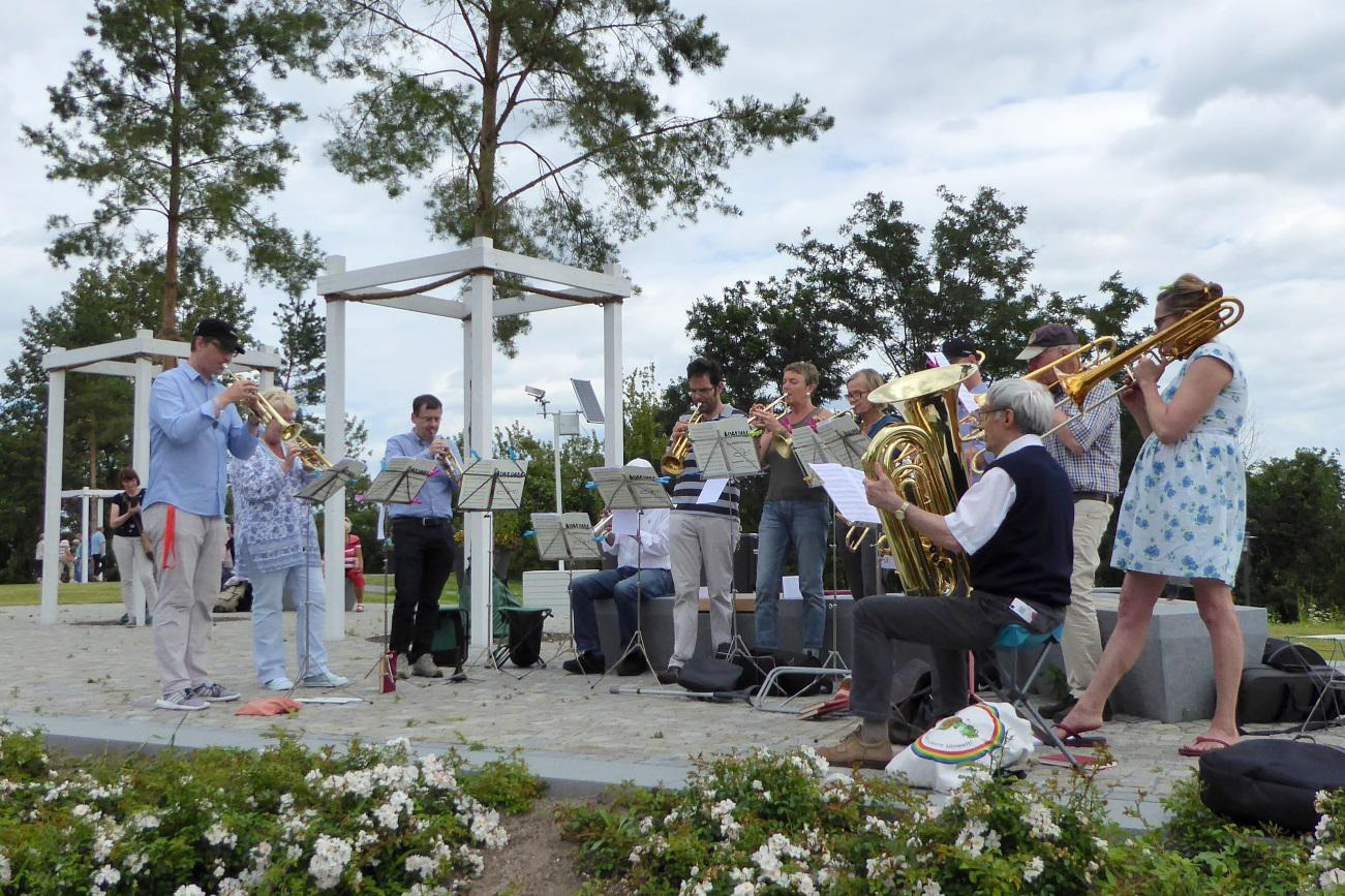 תזמורת כלי הנשיפה של כנסיית אמאוס בקרויצברג, ברלין, גרמניה